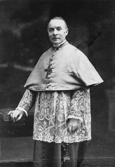 Portrait de Monseigneur Grente, évêque du Mans (photographie de presse)